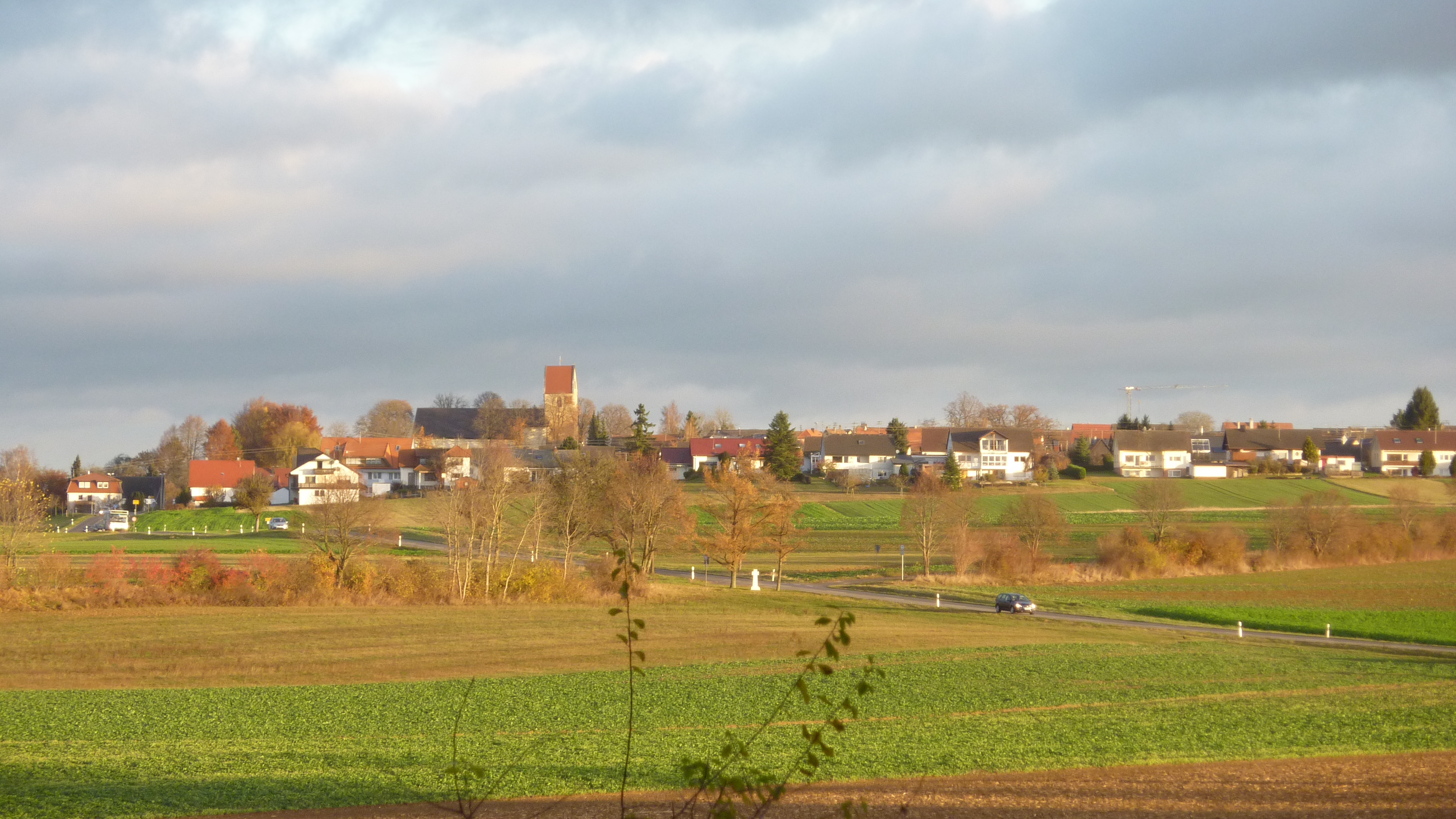 HochmössingenOT von Obenrdorf/N